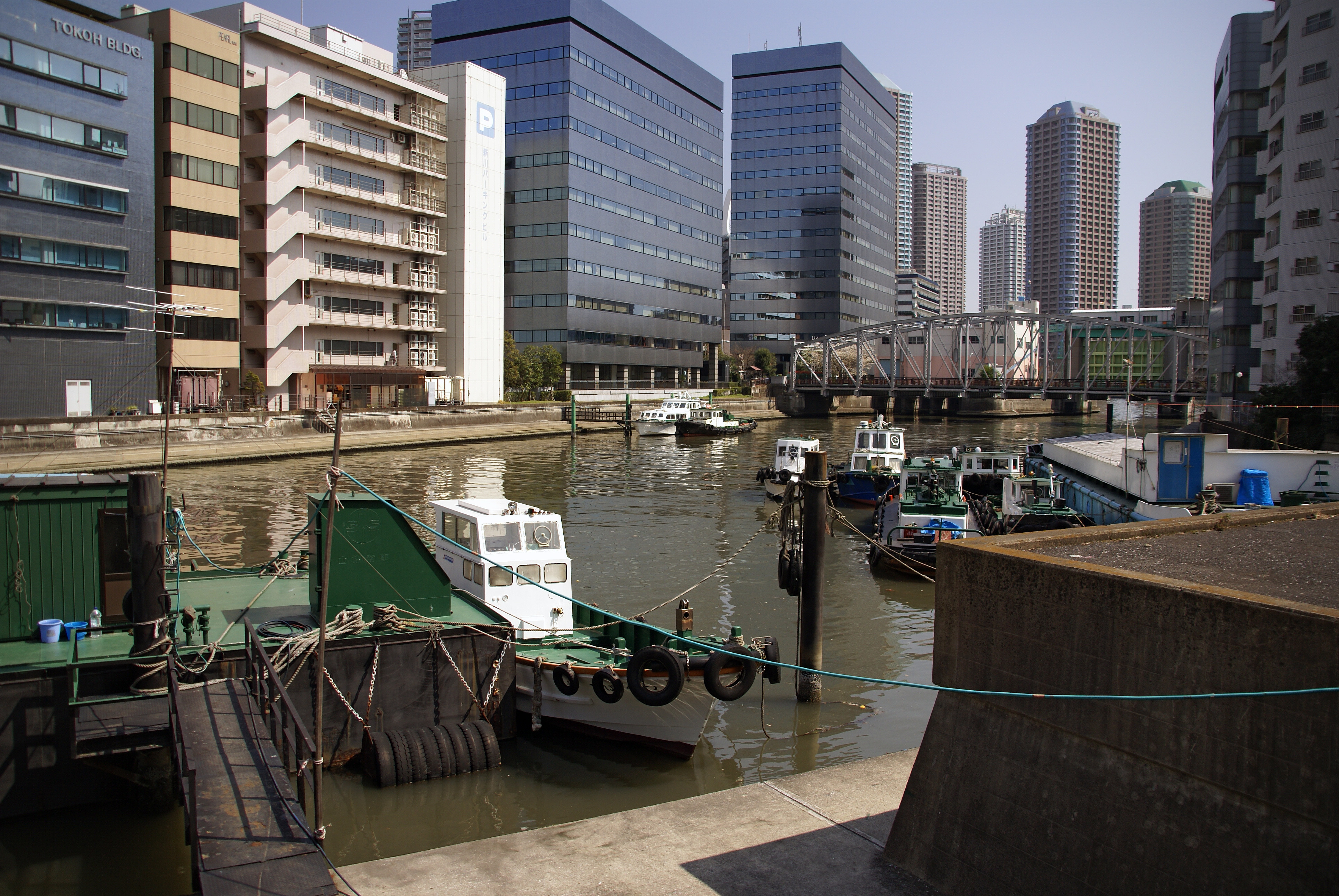 Kameshima River in Chuo-ku, Tokyo, Japan